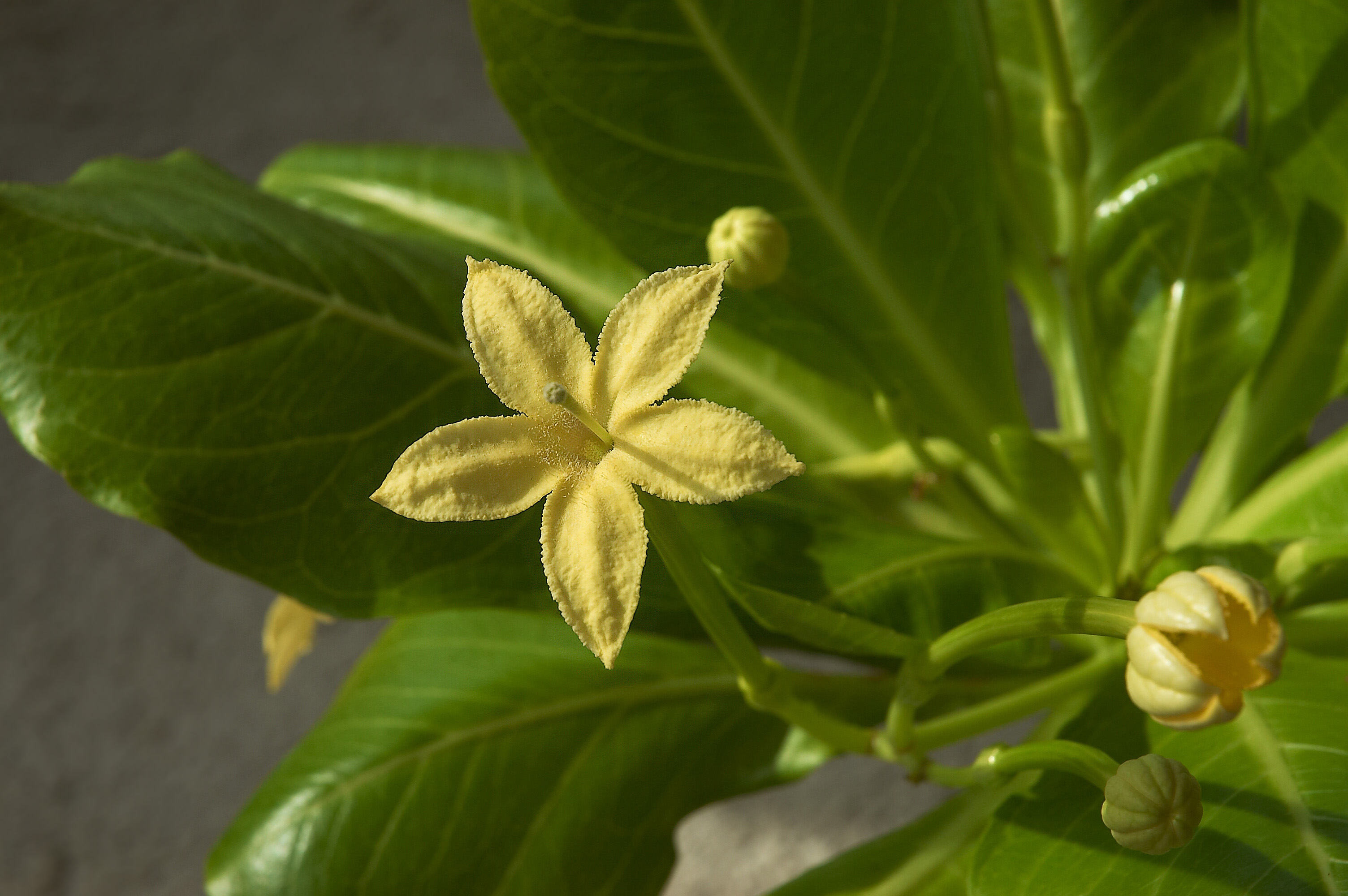 Brighamia insignis